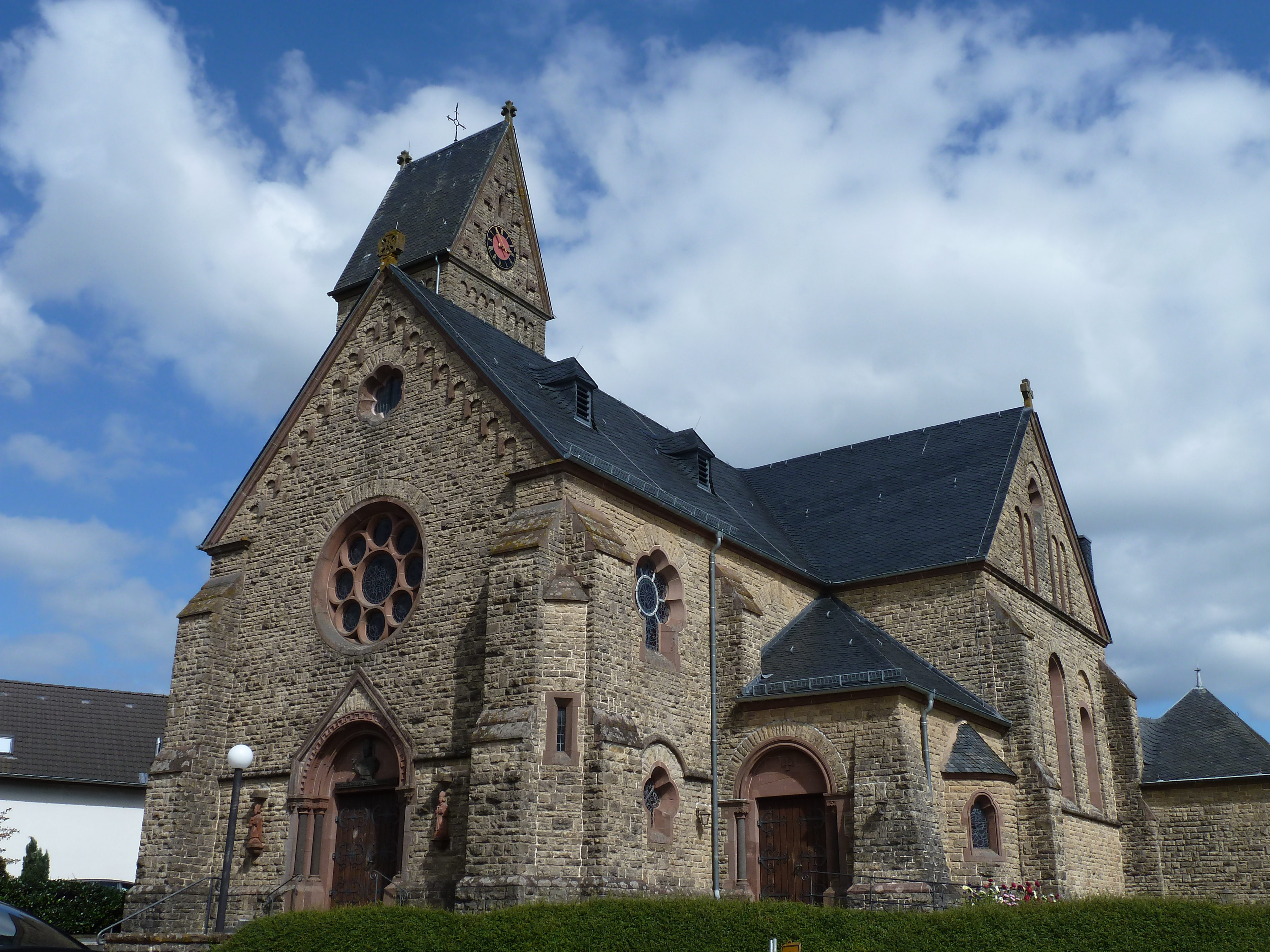 Sint Eligius kerk in Badem